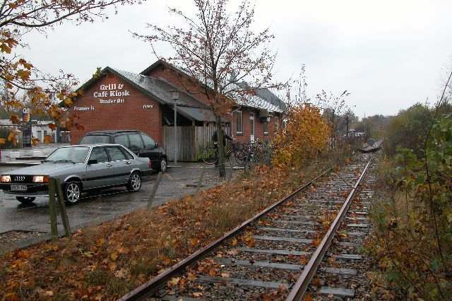 Bahnhof Tondern-Ost